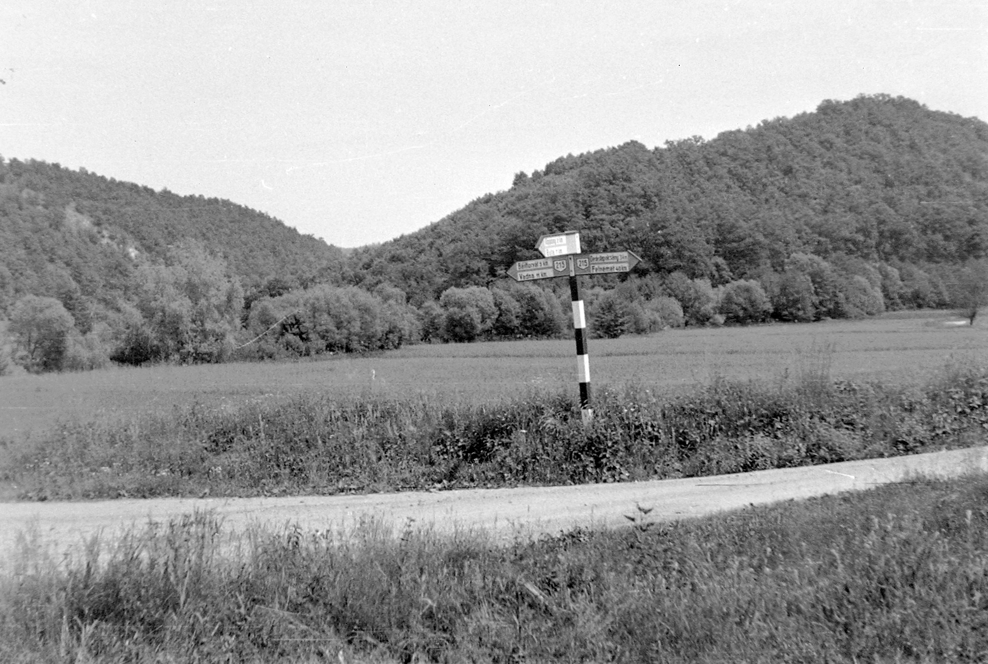 a helységek által alkotott háromszög (ma a Lázbérci víztározó van a útirányjelző táblák helyén). Location: Hungary, Uppony, Bánhorváti, Dédestapolcsány Tags: road signs, landscape Title: a helységek által alkotott háromszög (ma a Lázbérci víztározó van a tábla helyén).